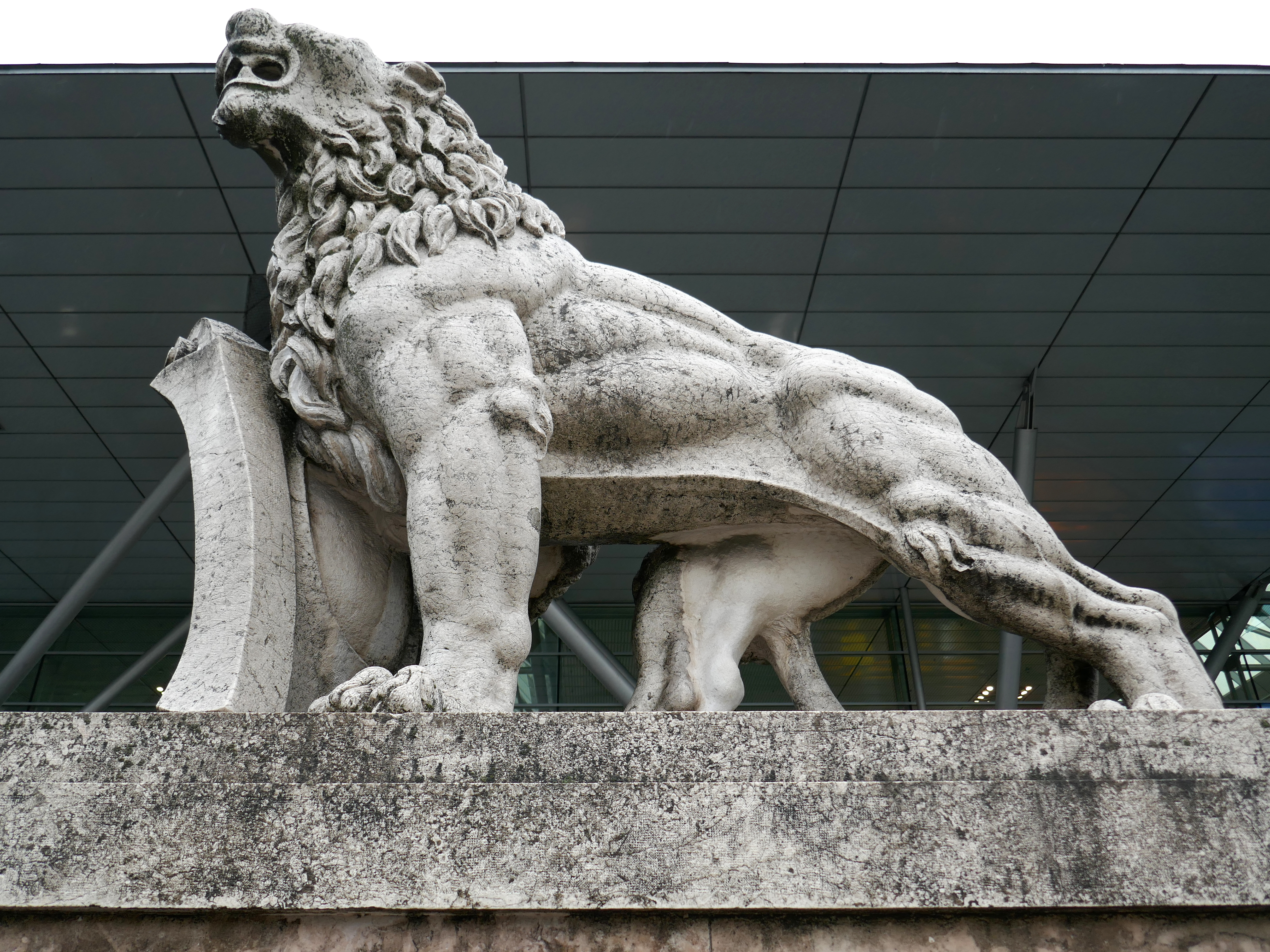 Jakob Adlhart Löwen - Linz Hauptbahnhof.